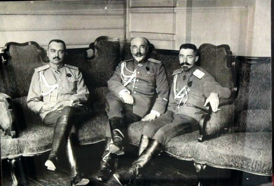 генералы Юзефович, Деникин и Марков в Ставке Главнокомандующего Русской армией генерала Михаила Алексеева в Могилёве, май 1917 года.